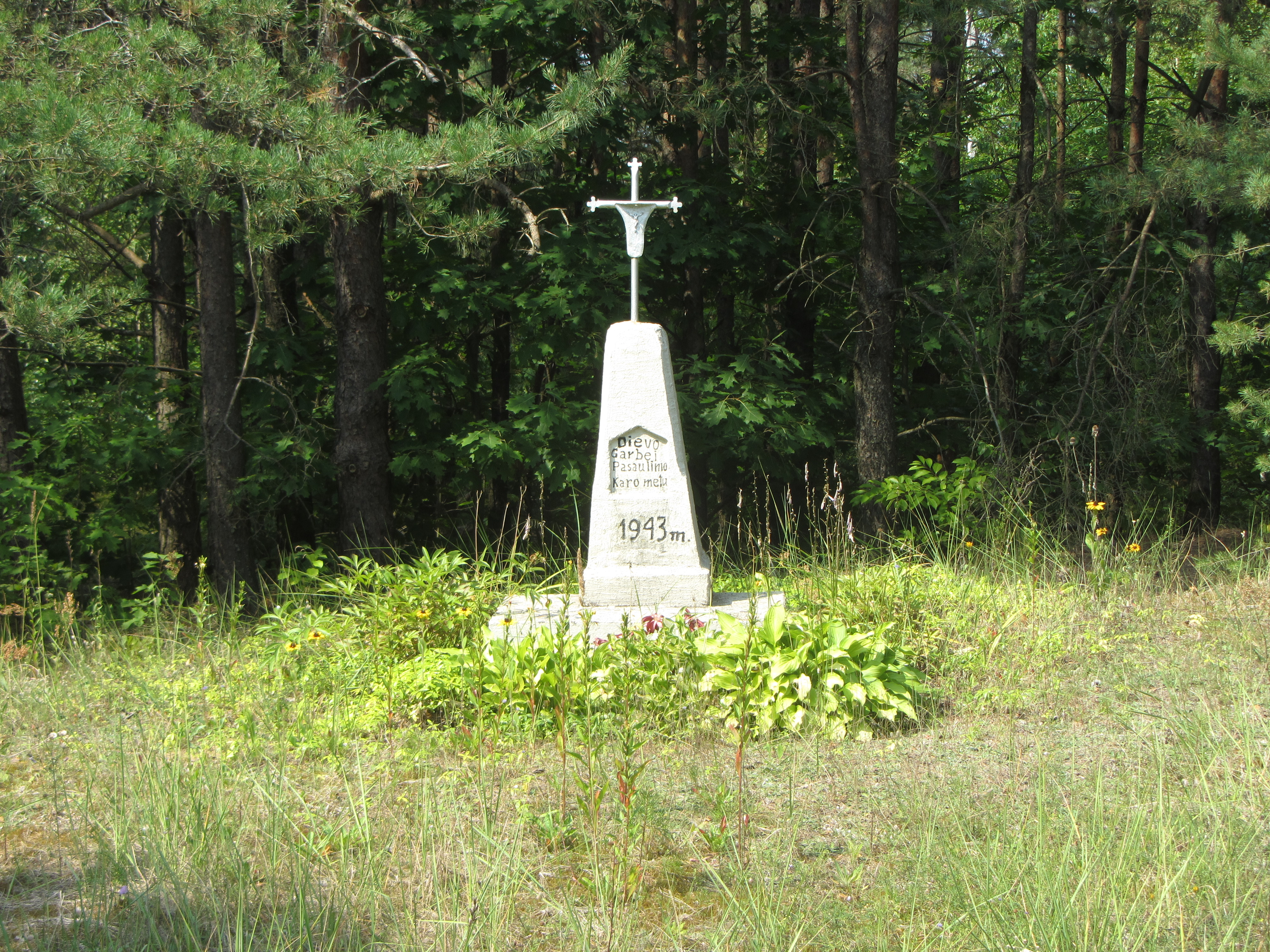 Kapčiamiesčio sen., Lithuania